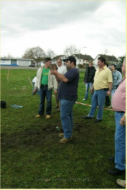 Bootsch-Turnier Singen 2005, Zielen, Wurfvorbereitung